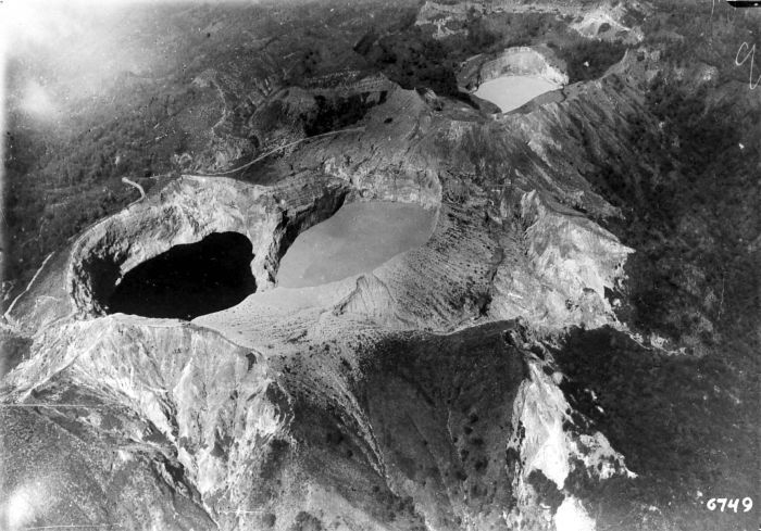 Negatief. Luchtfoto van de drie gekleurde meren van de vulkaan Kelimoetoe